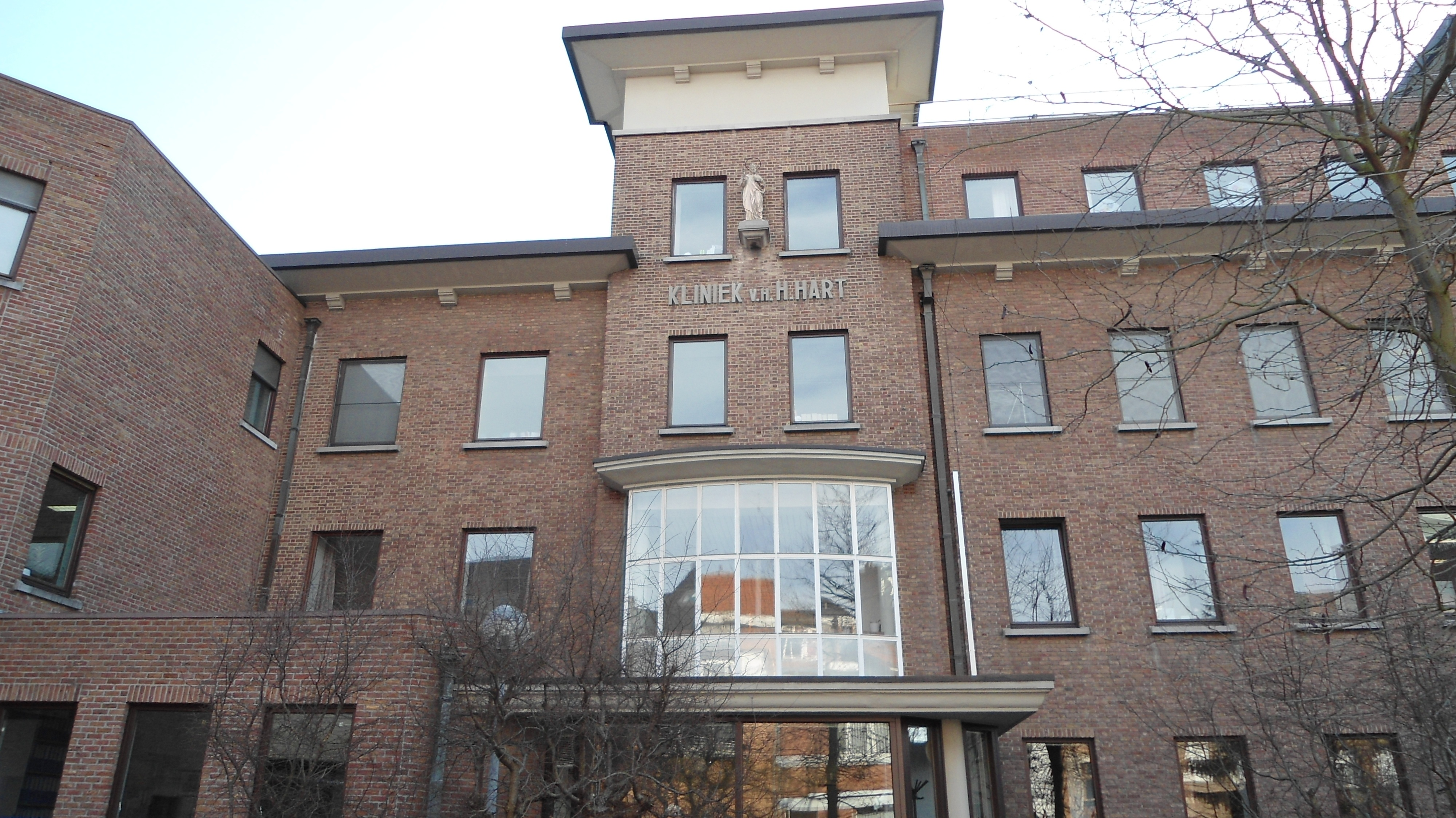 Heilig Hart Kliniek - Kliniekstraat - Tienen - Vlaams-Brabant - België